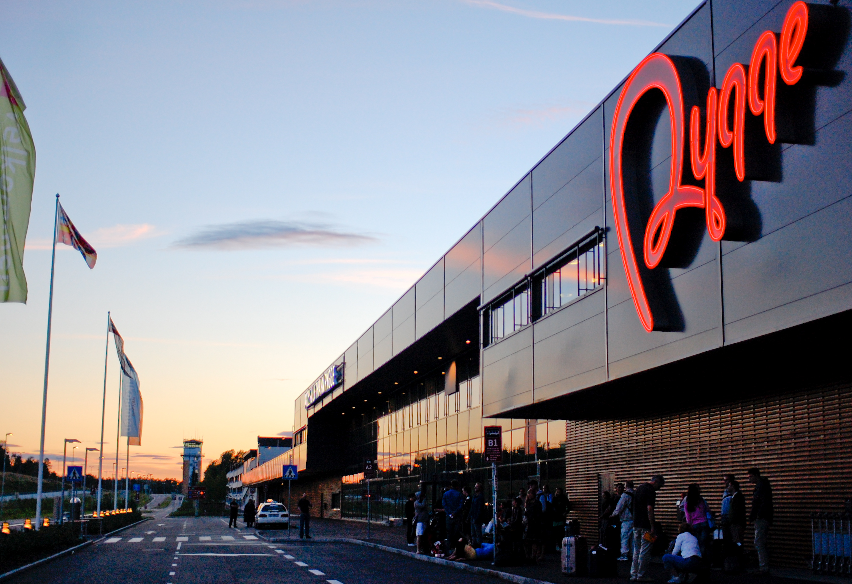 Moss flyplass, Rygge, sommer 2008